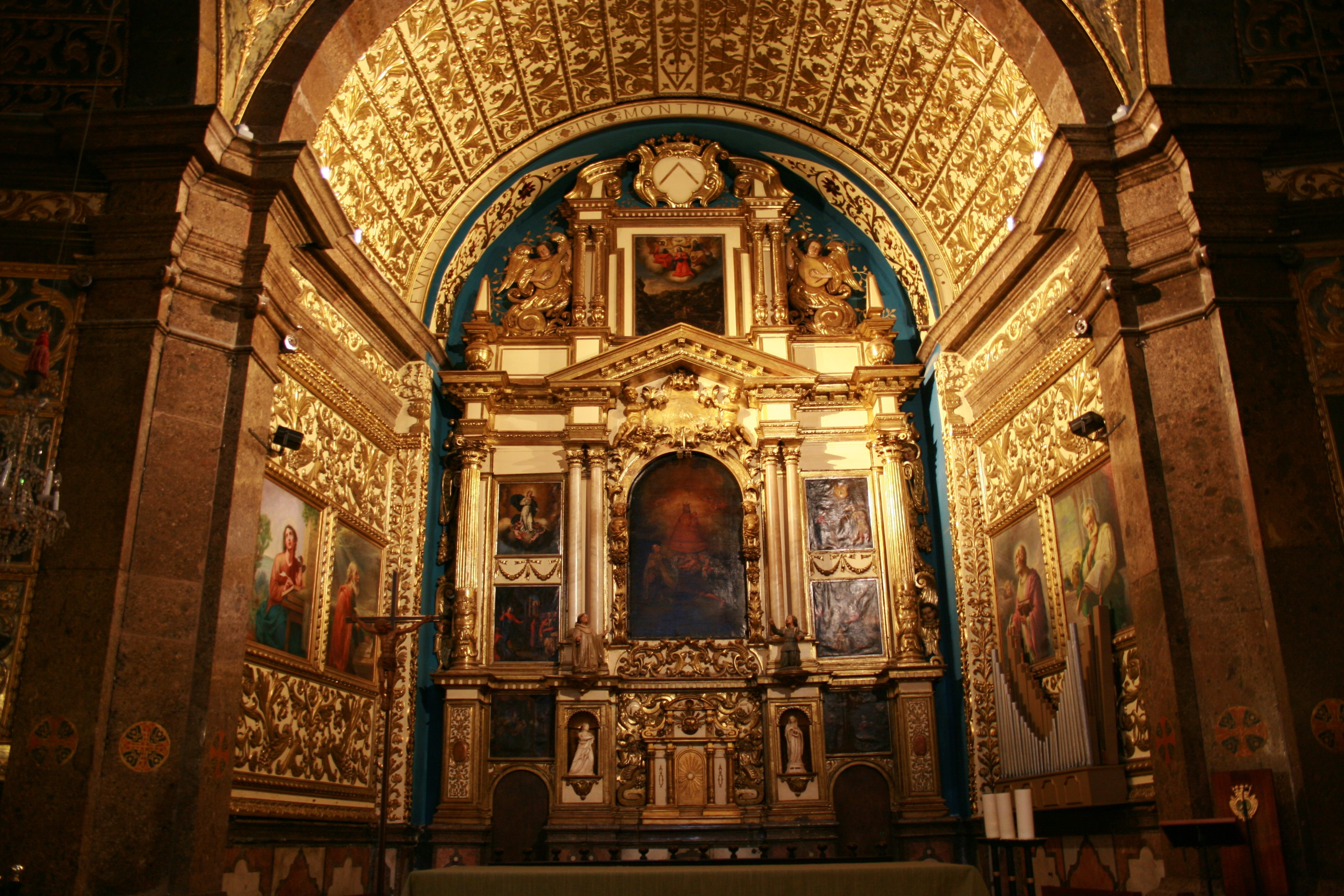 Basilica of Santuari de Lluc in Escorca, Mallorca